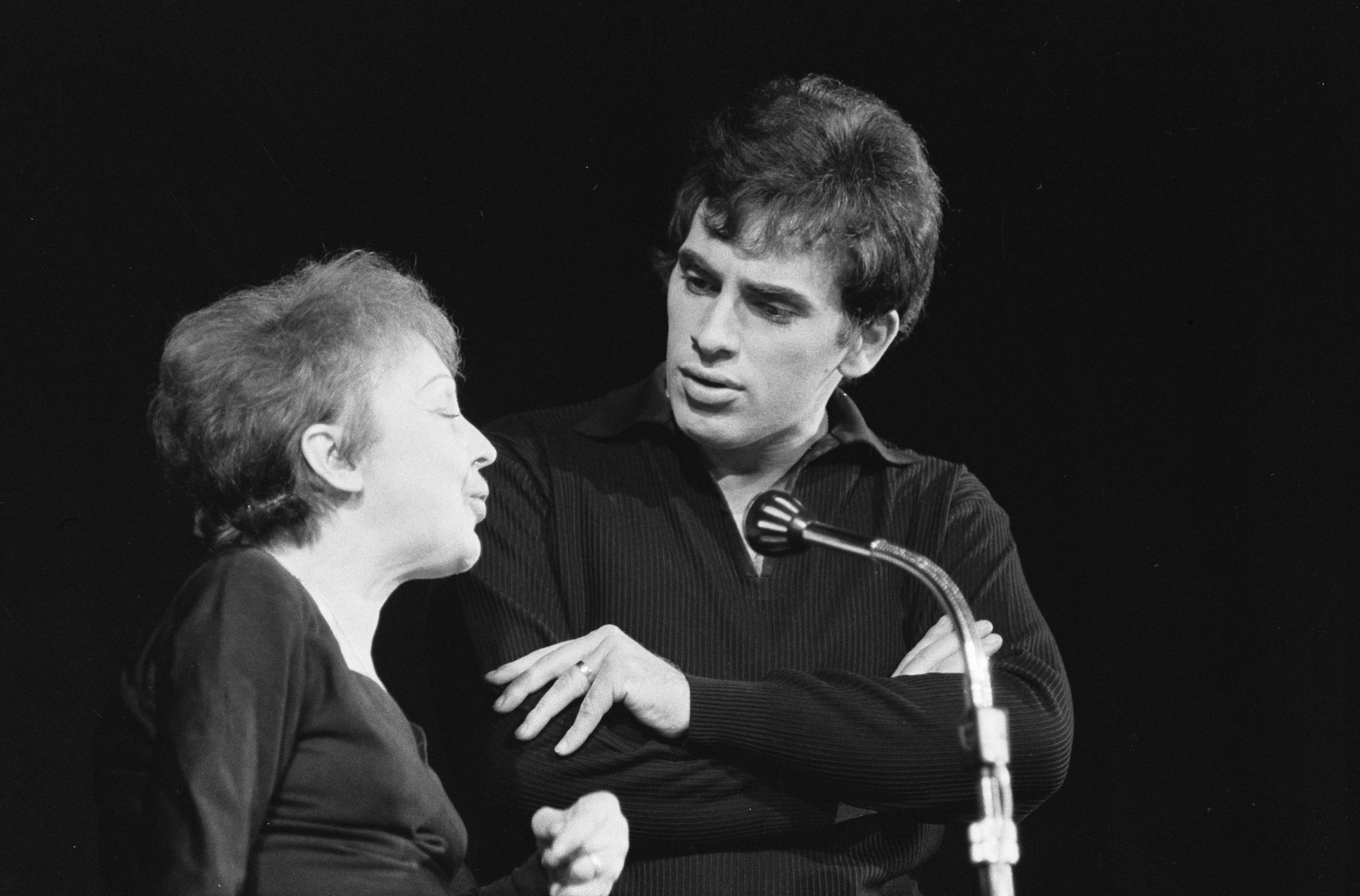 Édith Piaf tijdens een optreden in Rotterdam. Hier samen met haar echtgenoot Theo Sarapo.